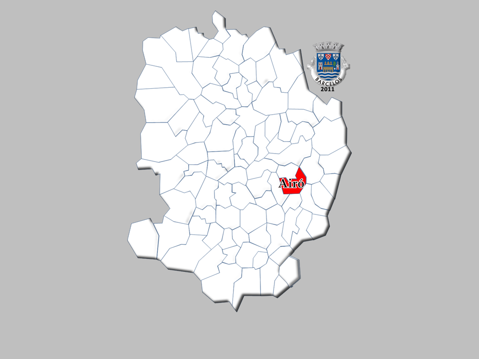 Censos 1864/2011